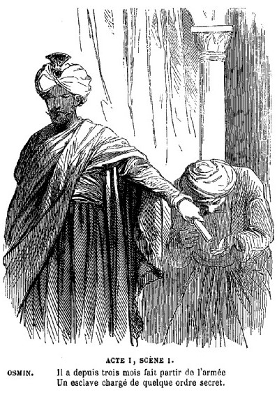 Illustration par Pauquet de la tragédie Bajazet de Racine, dans le Panthéon populaire illustré, 2e série, 1851